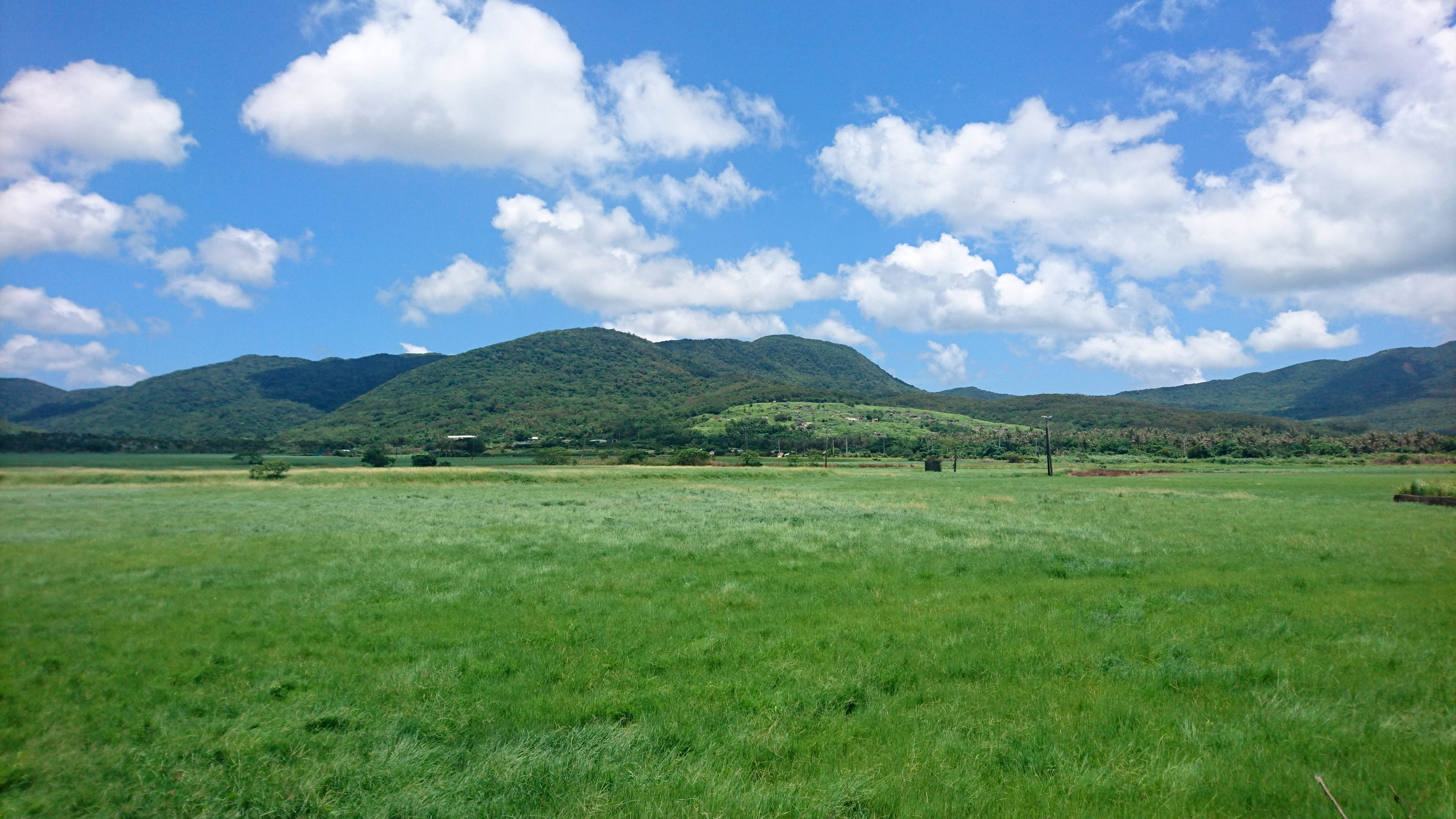 離開滿州市區週遭的景色可望見兩側的山景